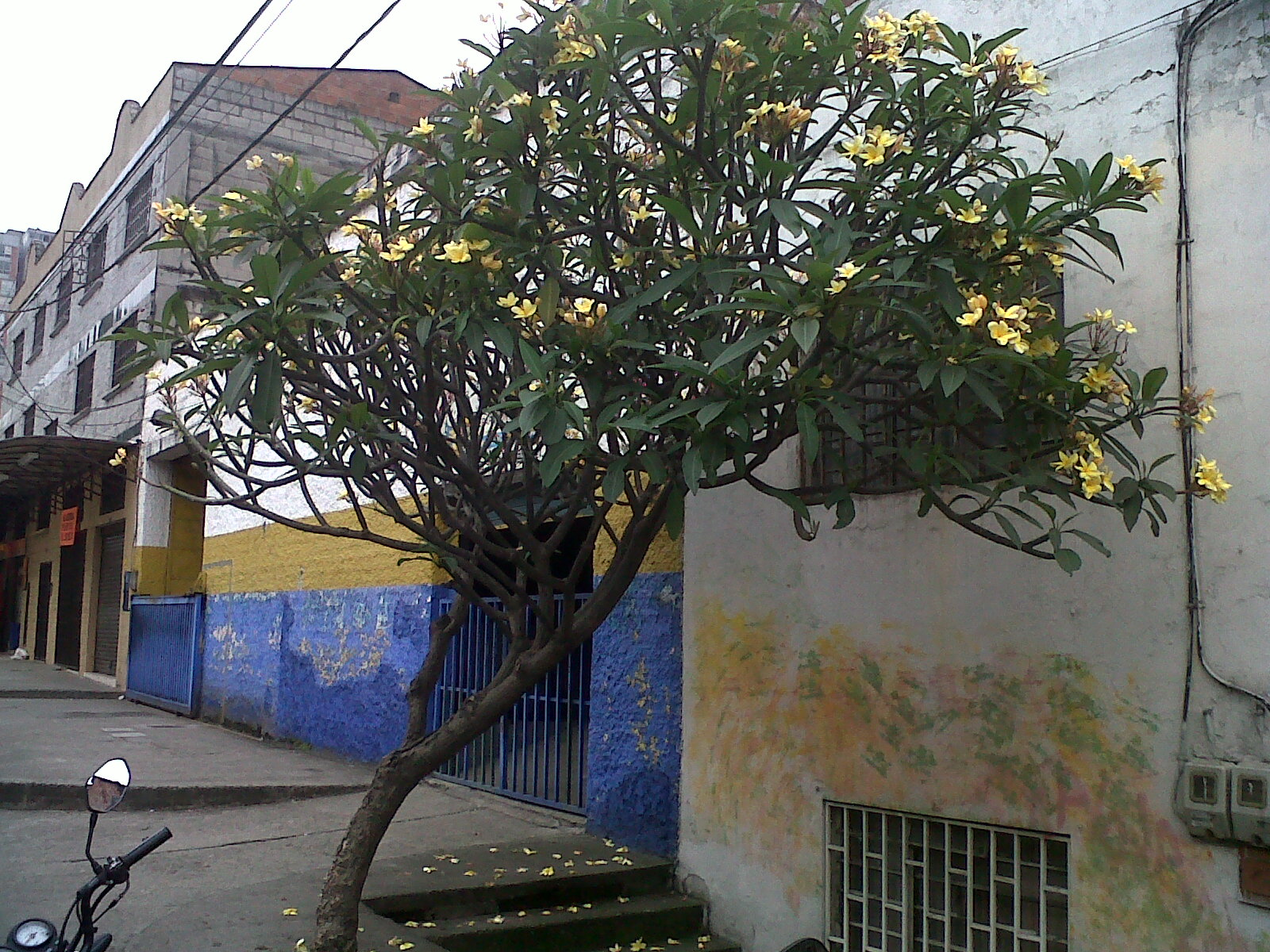 Árbol de Chagualo en el barrio del mismo nombre, Medellin, Colombia